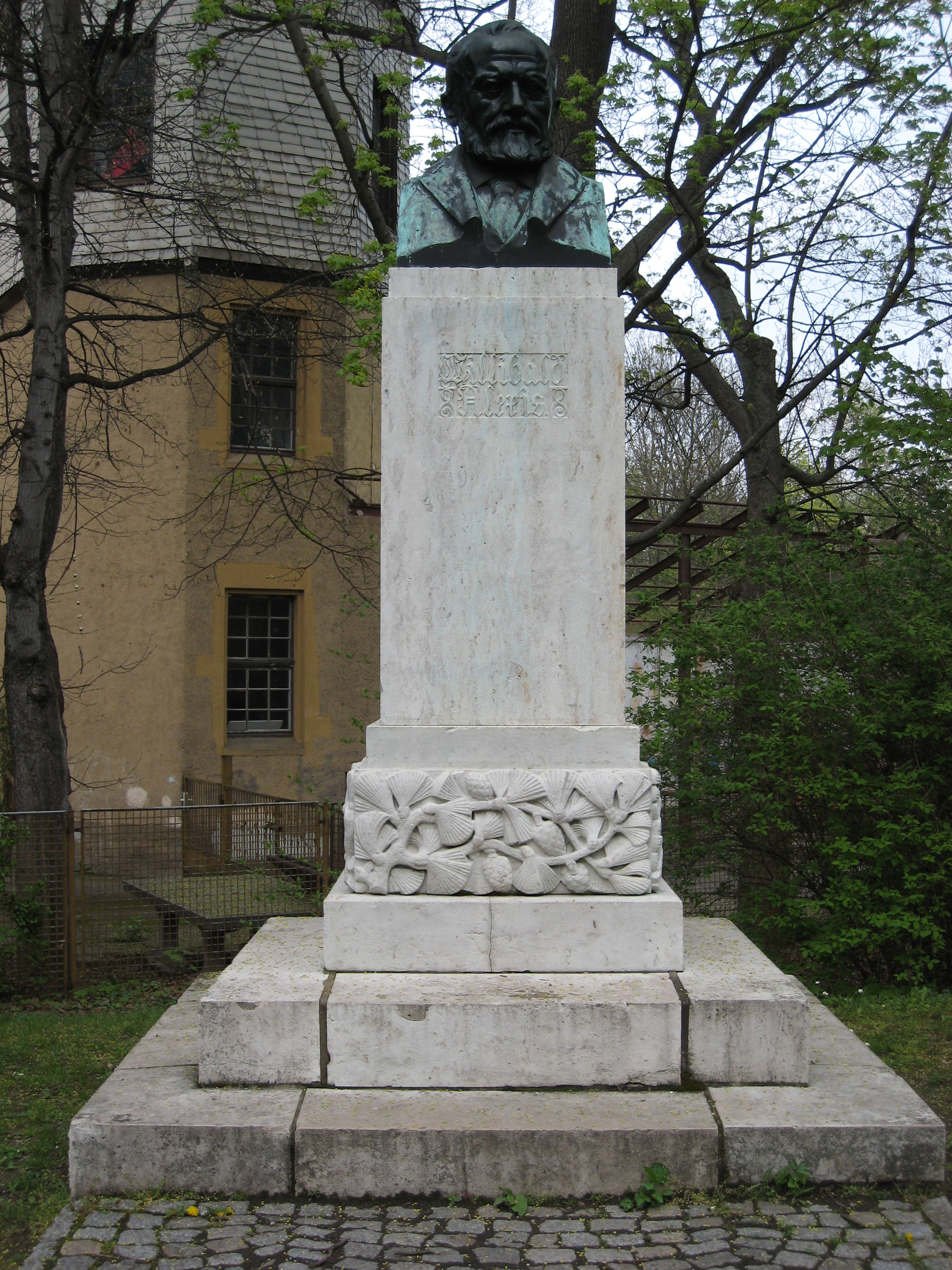 Denkmal für den Schriftsteller Willibald Alexis in Arnstadt, Kurhausplatz/Nähe Lindenallee.